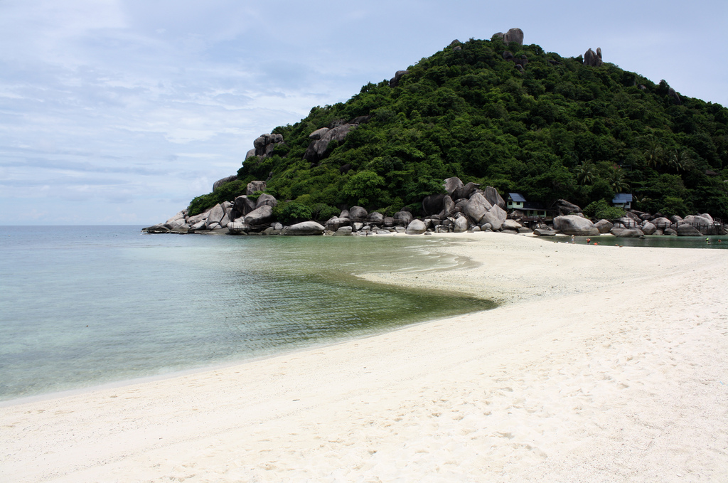 Koh Nangyuan, near Koh Tao, Thailand